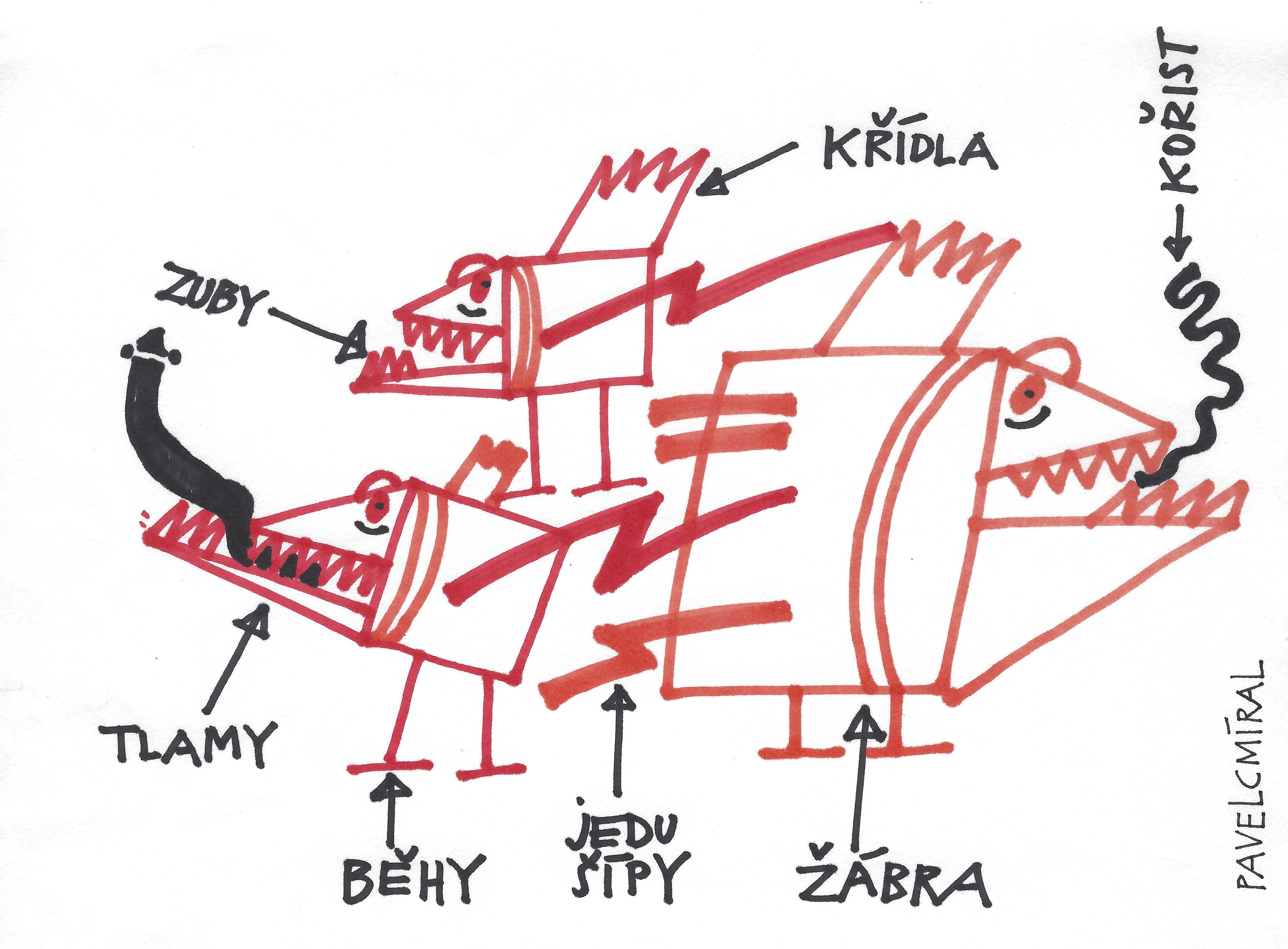 Kresba od Pavla Cmírala.